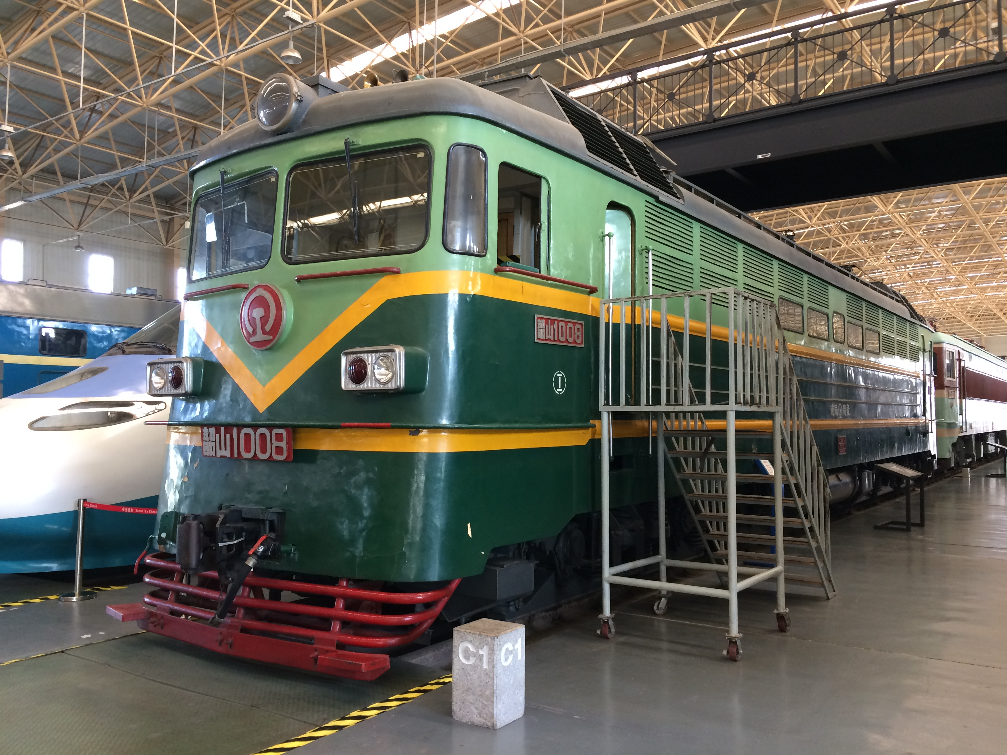 韶山1型008号车是首台量产的韶山1型机车，目前保存于中国铁道博物馆